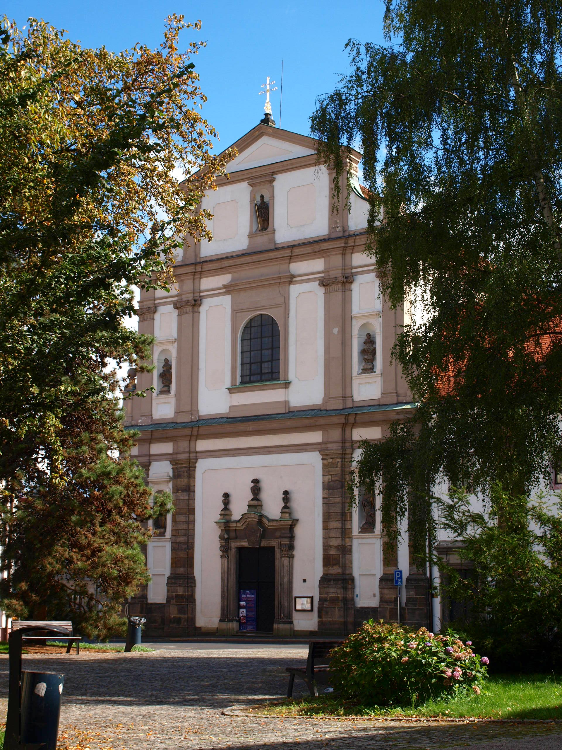 Česká Lípa